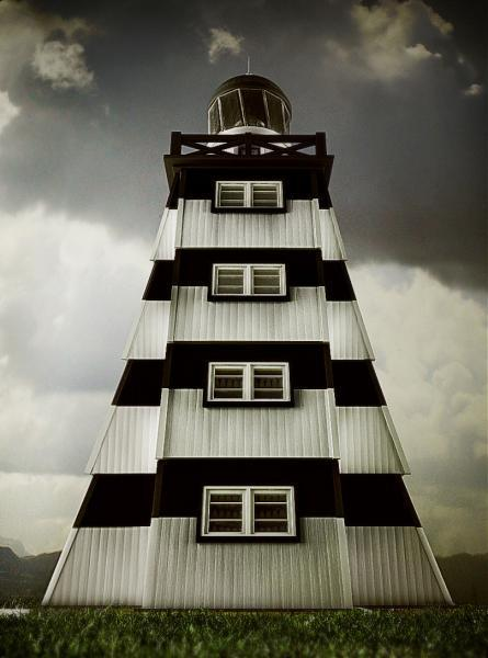 Phare du cap Kanine (district autonome de Nénétsie, Russie)